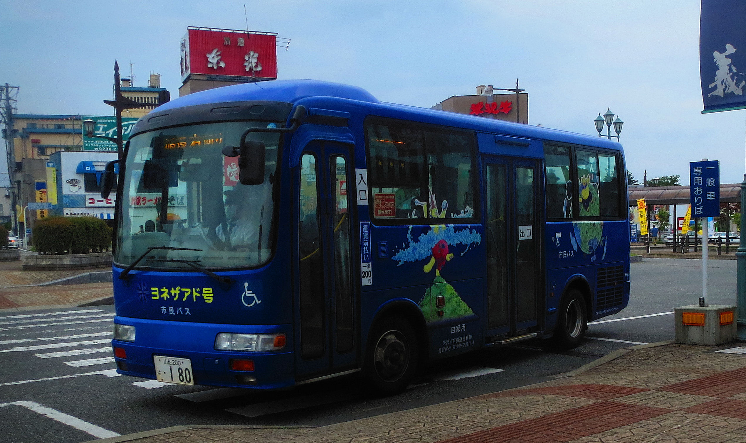 市街地循環路線（右回り）